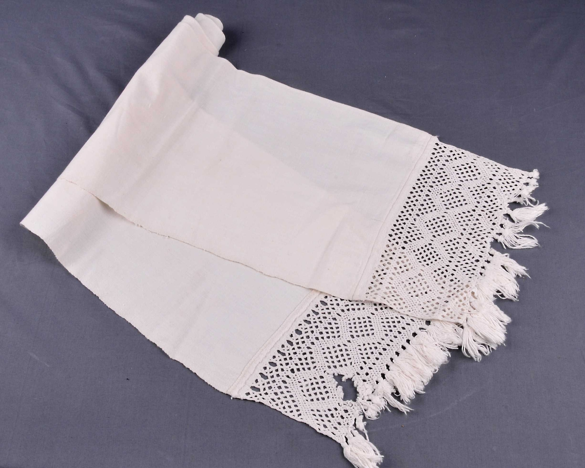 Firflettet hånkle fra Vest-Telemark.